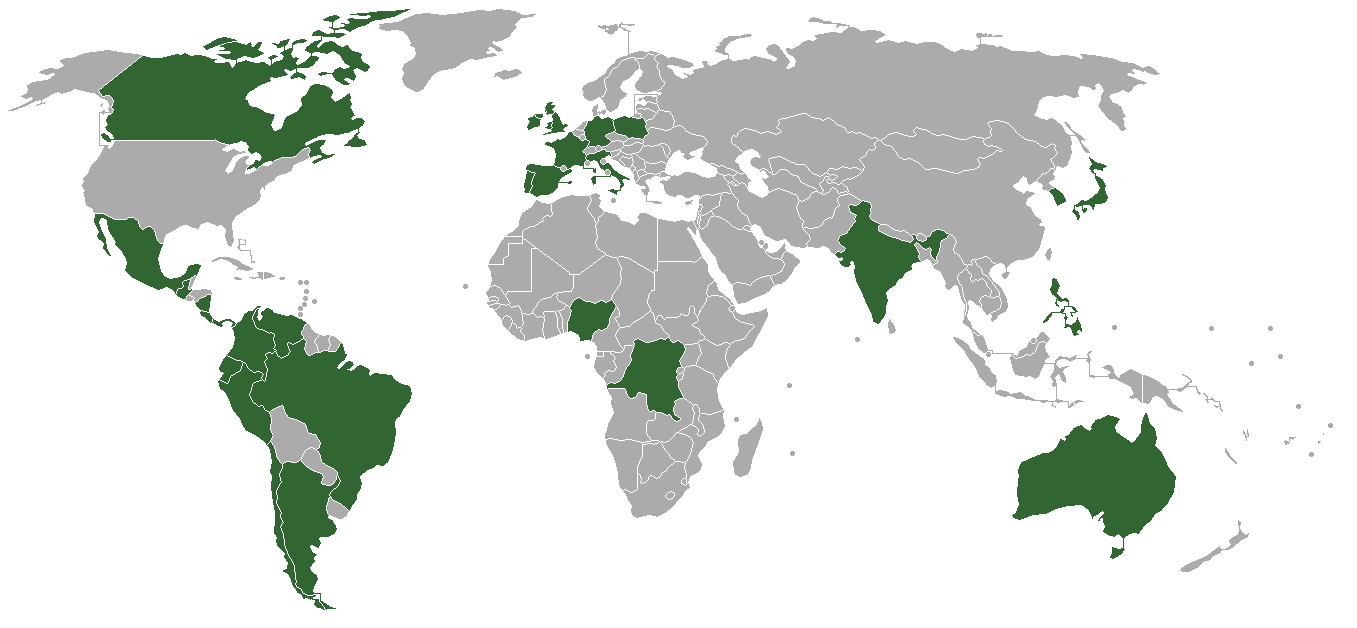 Obecność Paulistów na świecie